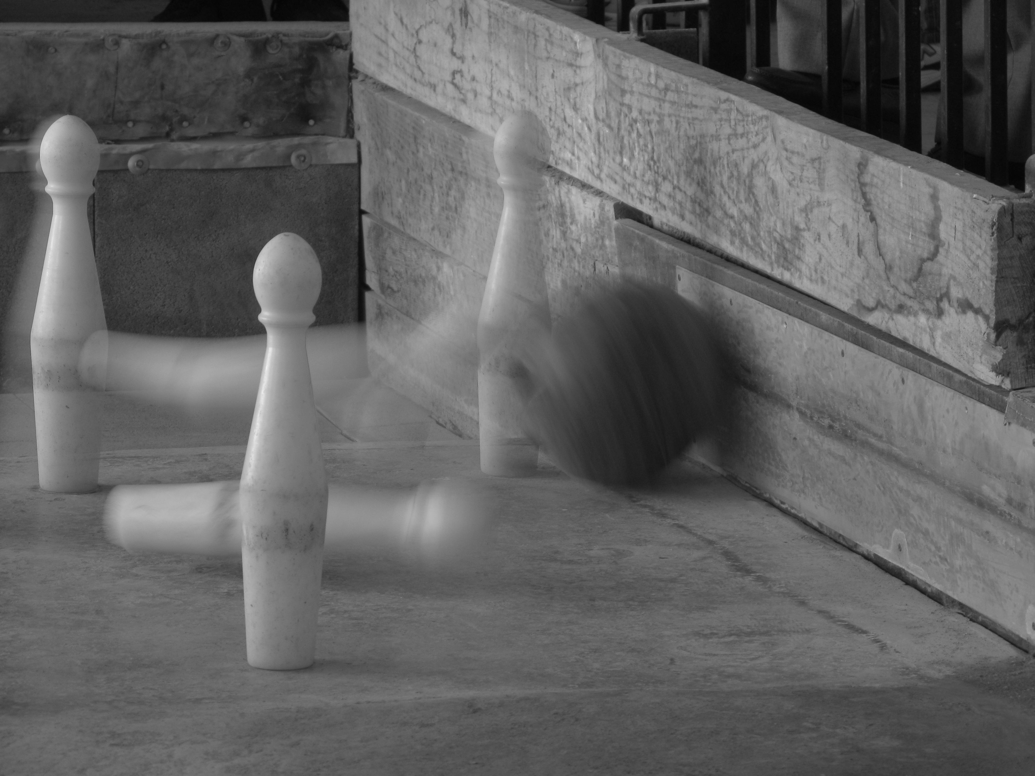 Bola jokoa Urnietan.